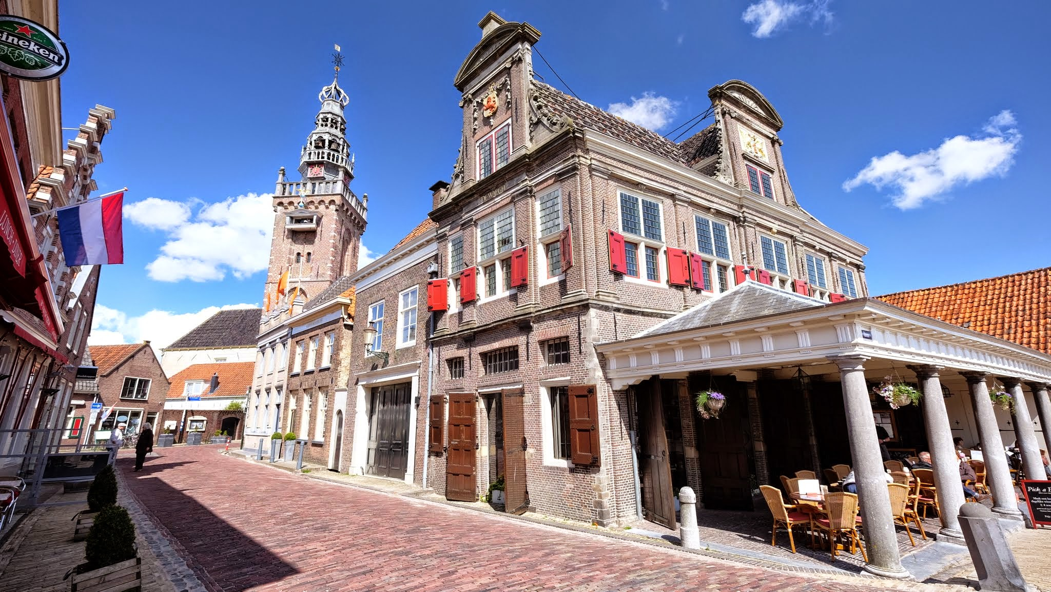 1141 Monnickendam, Netherlands